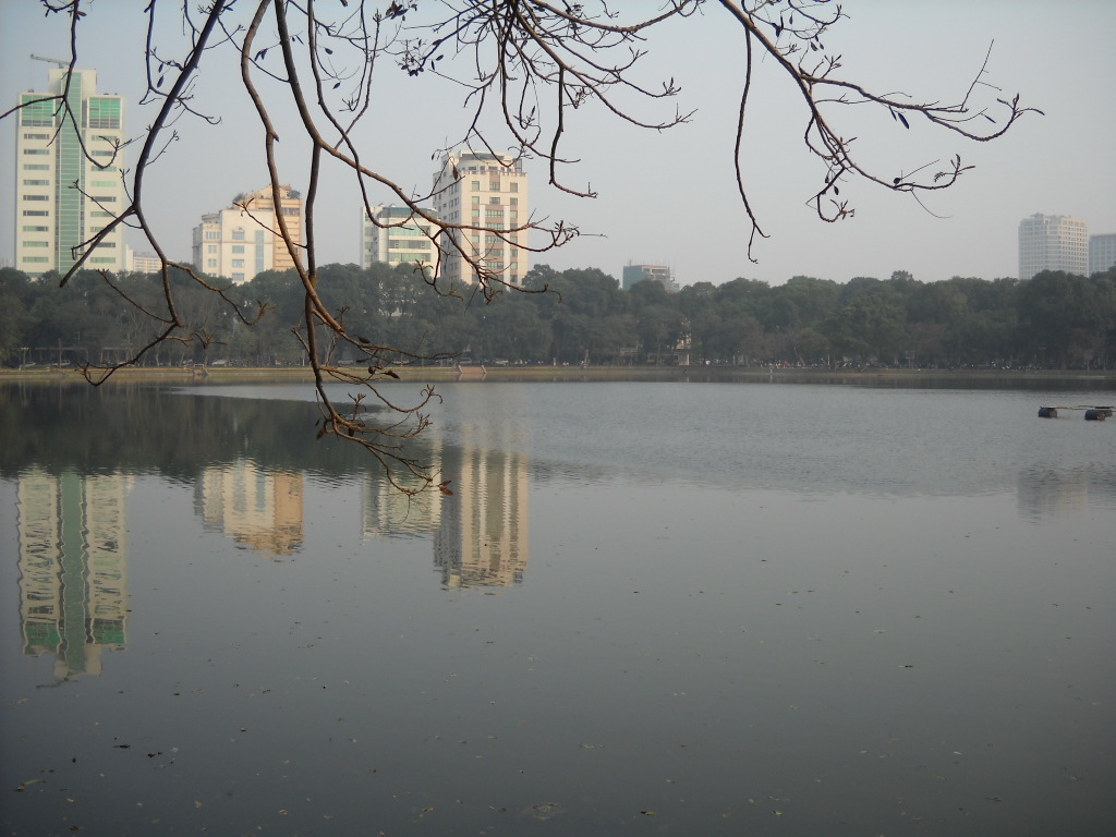 Hồ Thiền Quang, Hà Nội.